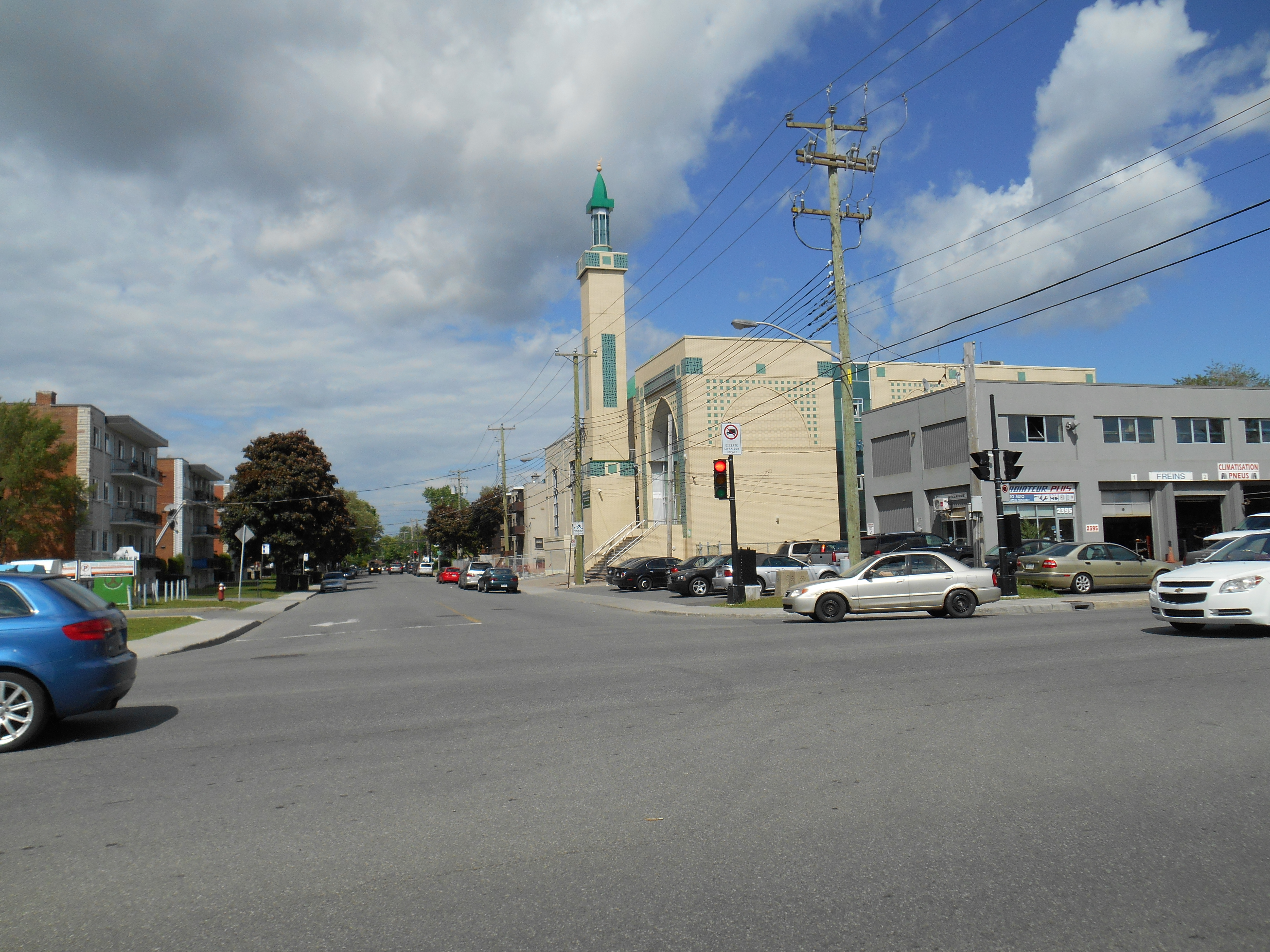 Centre islamique du Québec, 2520, chemin Laval, Saint-Laurent, Montréal